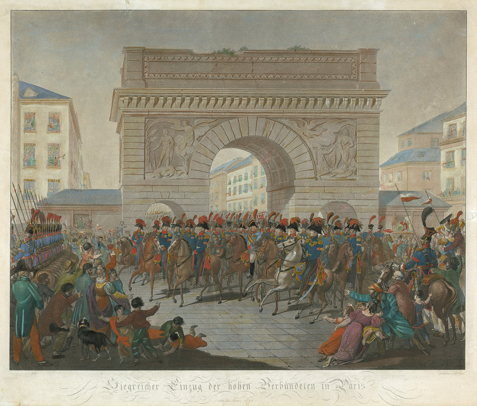 Siegreicher Einzug der hohen Verbündeten (Kaiser Franz I., Zar Alexander I. und König Friedrich Wilhelm III.) in Paris am 31. März 1814. Aquatinta mit sorgfältigem zeitgenöss. Kolorit. 52 x 59,7 cm. Gezeichnet von L. Wolf, gestochen von F. Jügel. Um 1815.